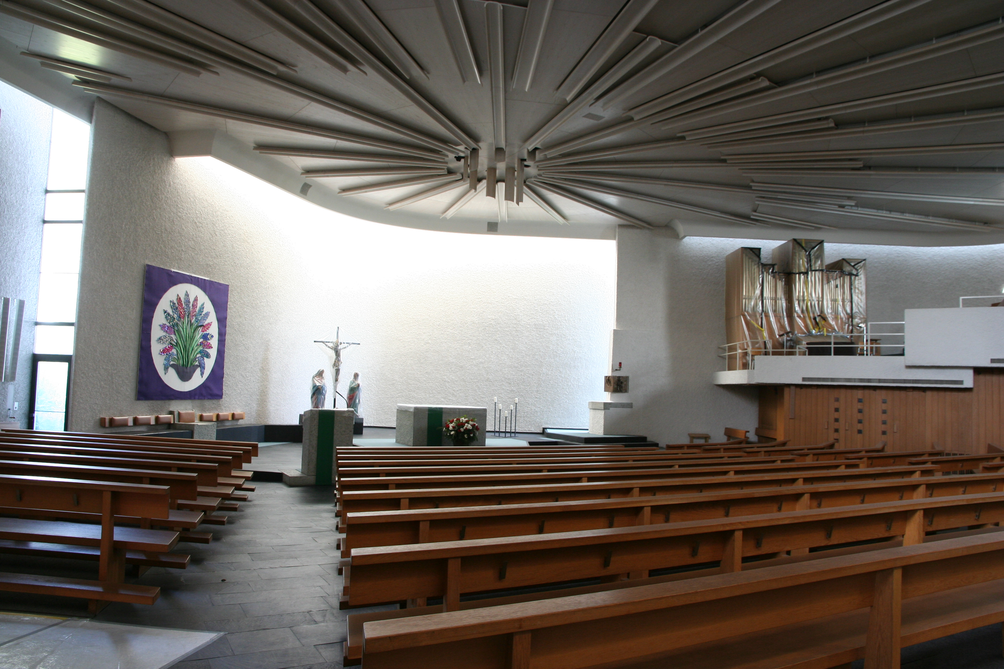 Katholische Kirche St. Maria in Müllheim TG